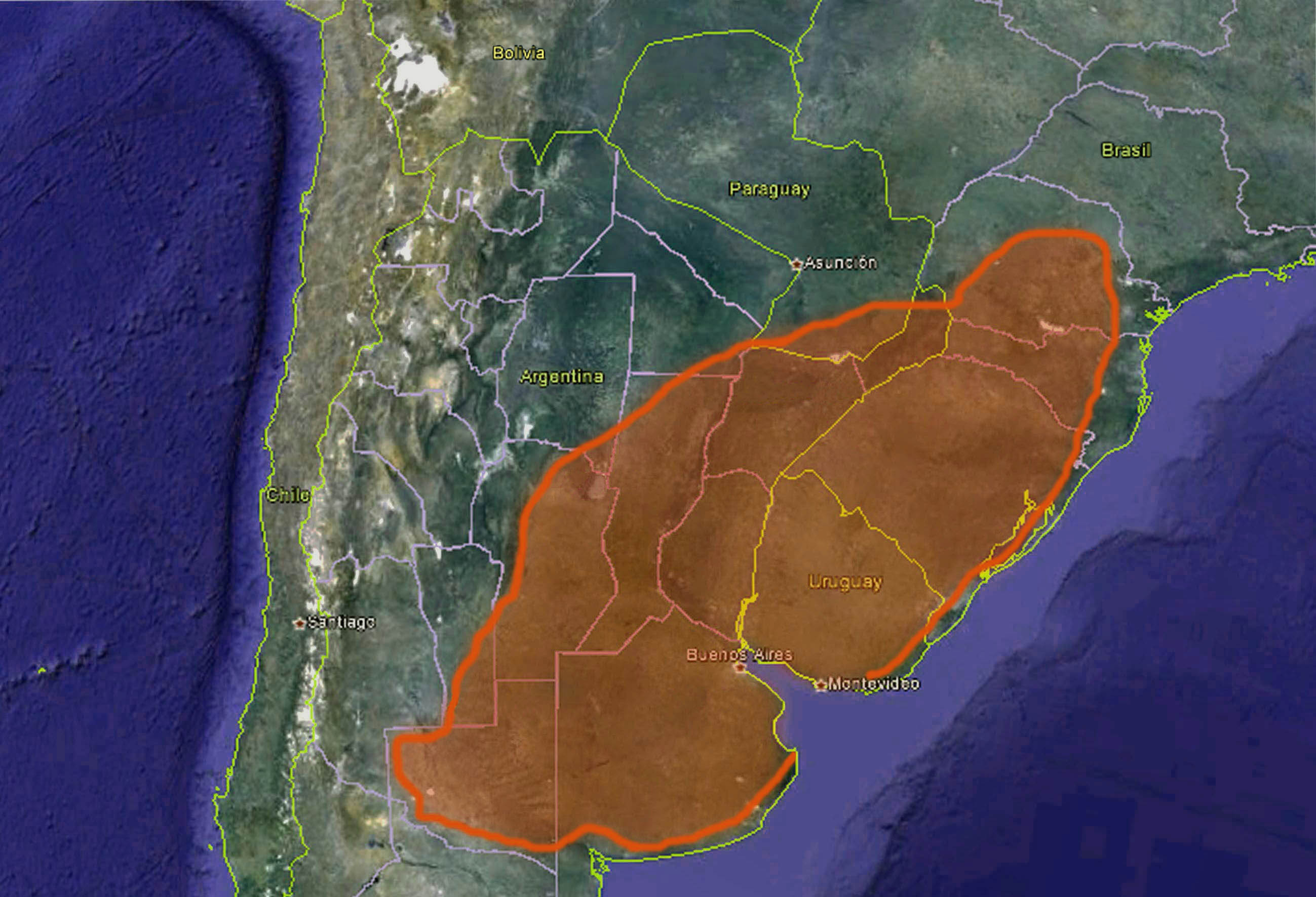 Mapa de la zona tornádica de América del Sur